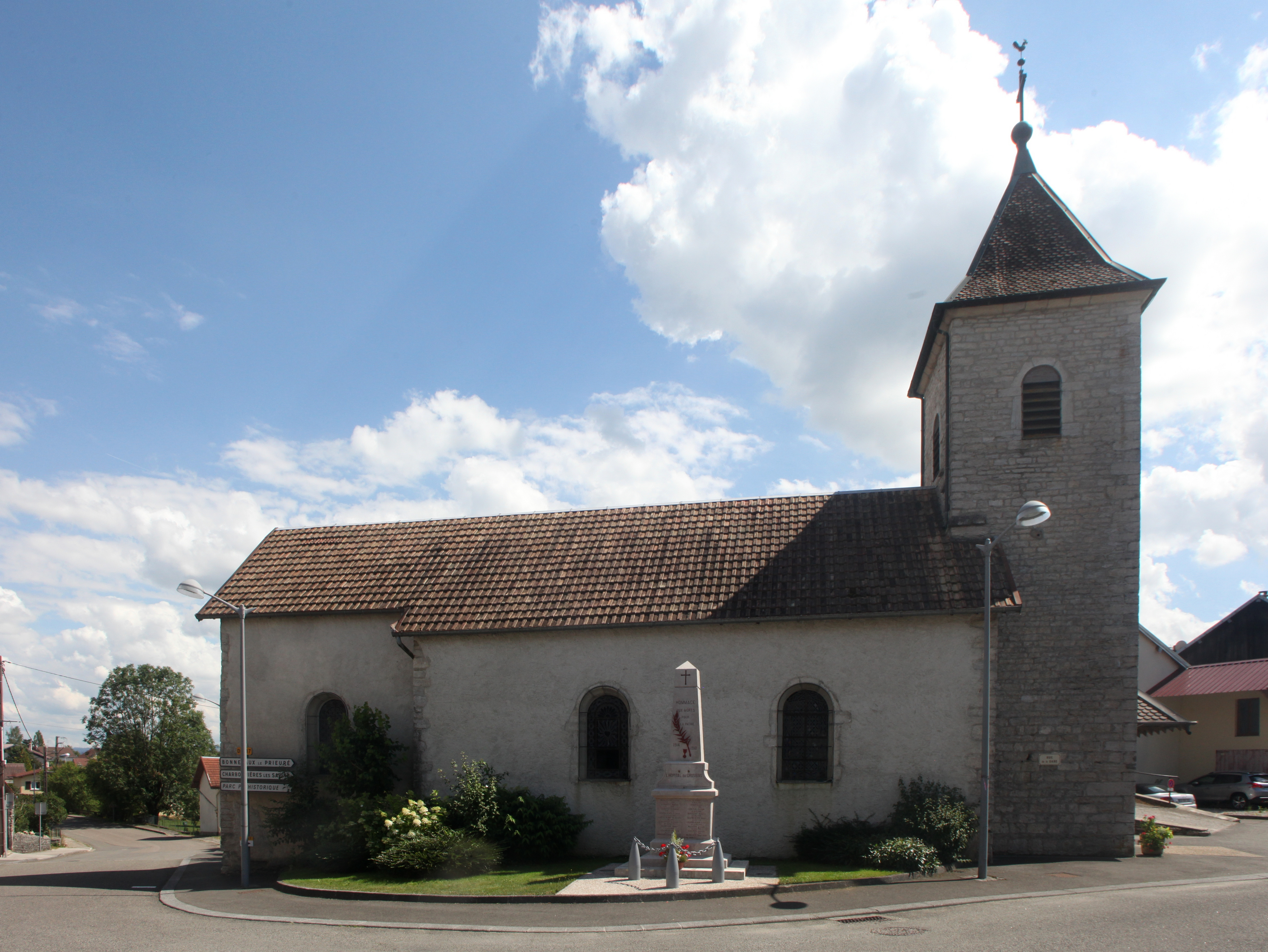 Église de L'Hôpital-du-Grosbois (Doubs).